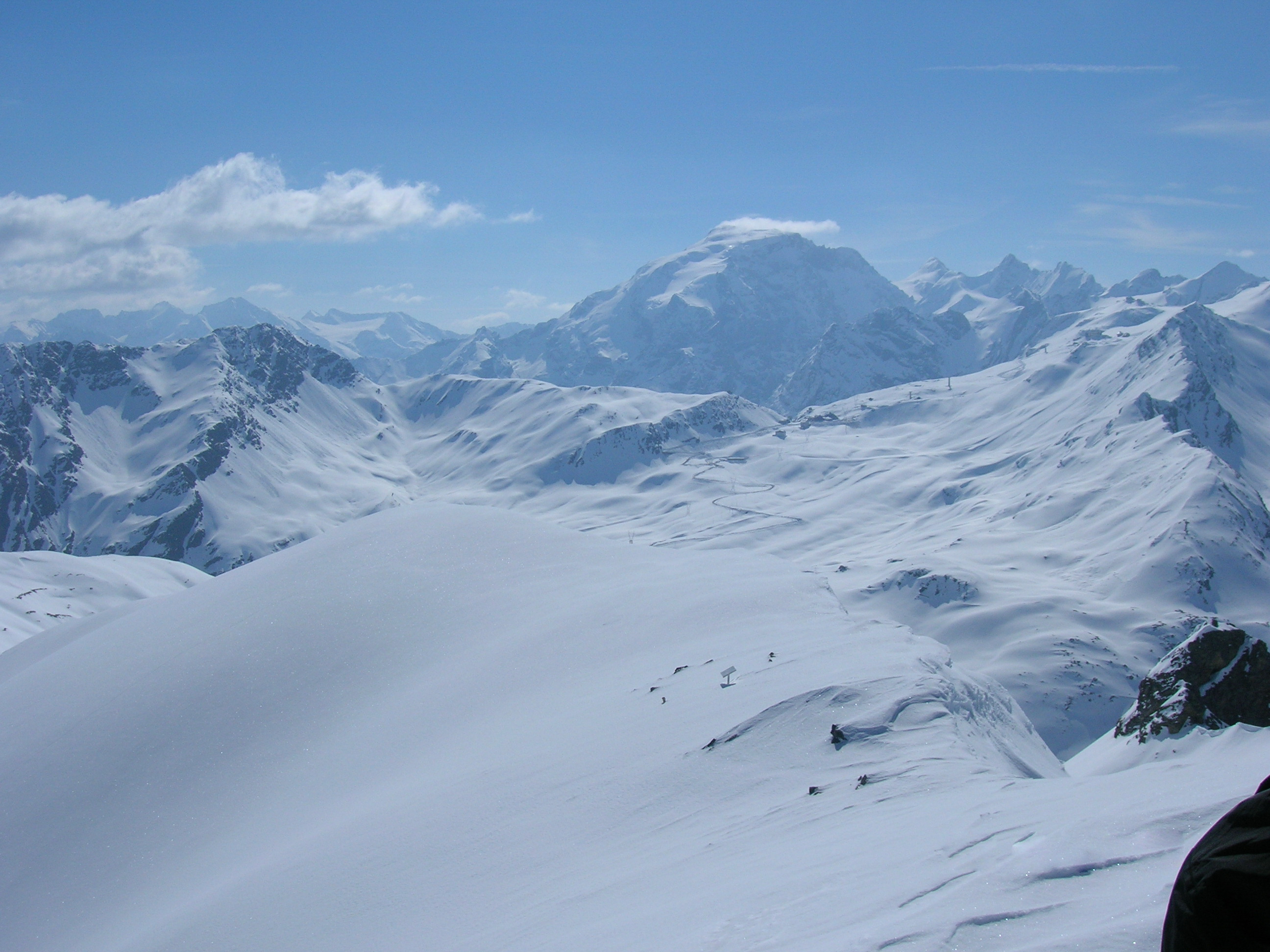 Ortles/Ortler e passo dello Stelvio/Stilfserjoch dalla punta di Rims (da nord-ovest), Valtellina. Sullo sfondo Thurwieser e cima di Trafoi